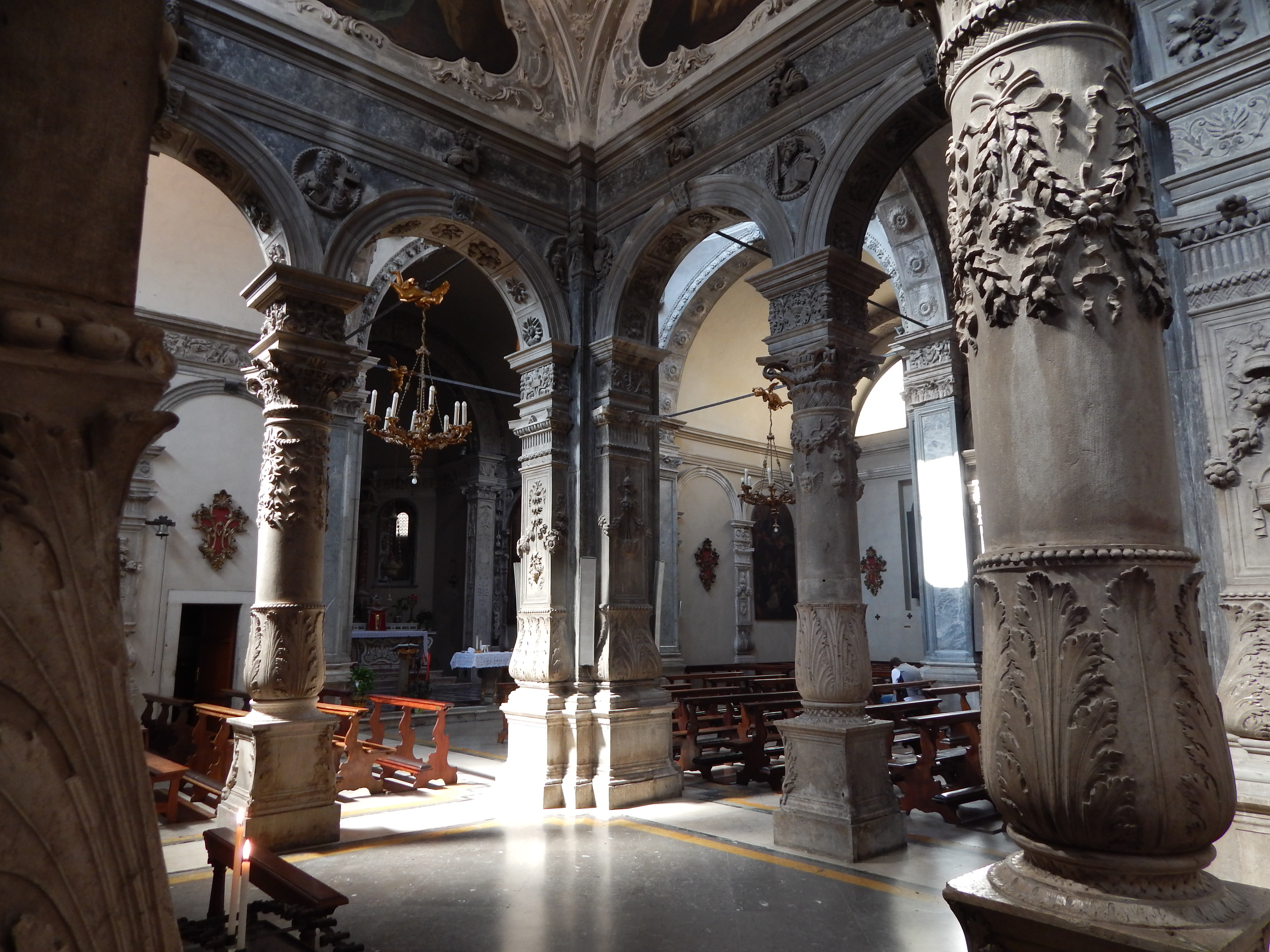 Santa Maria dei Miracoli (Brescia) - Interno